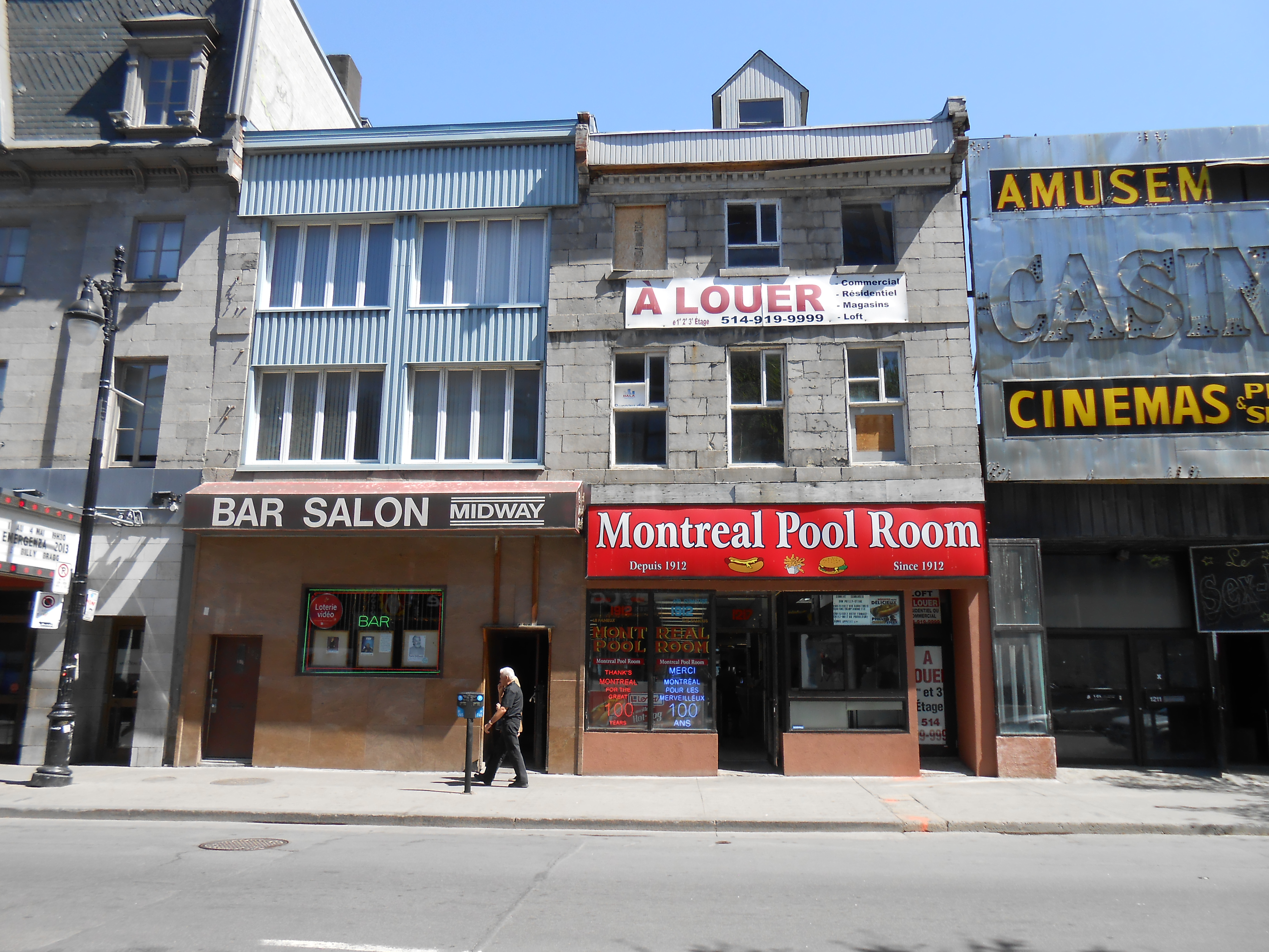 Façade de quelques édifices du boulevard Saint-Laurent à Montréal : bar salon Midway, Montreal Pool Room...